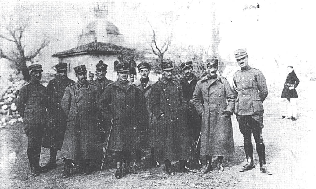 Το Επιτελείο της Ανεξάρτητης Μεραρχίας τον Νοέμβριο του 1921, στο χωριό Σουτζά Εντίν πλησίον του Σεγίτ Γκαζί.